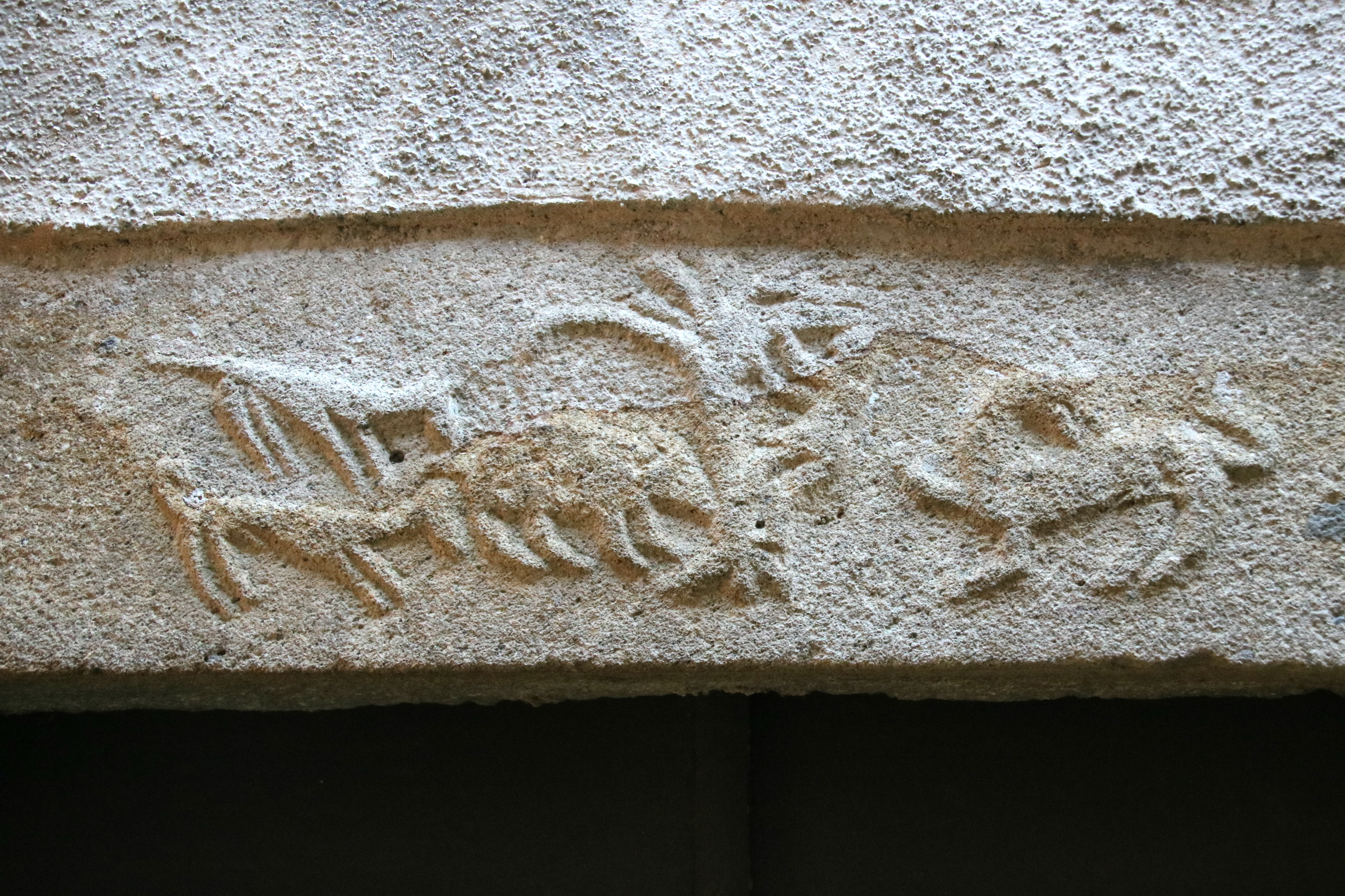 La caccia al cinghiale (Santa Fiora)